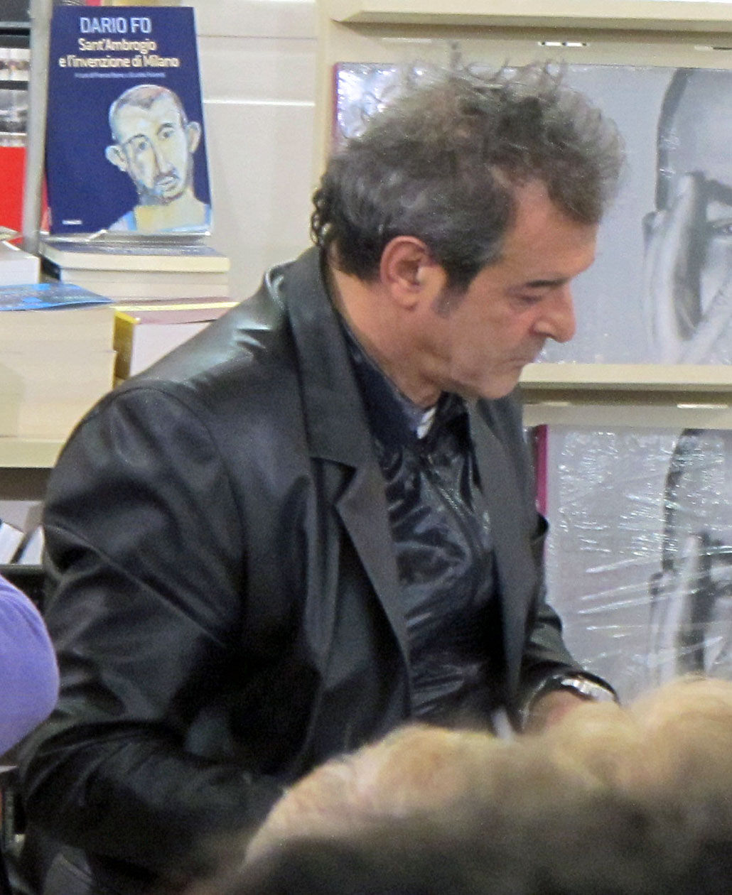 L'attore Ennio Fantastichini alla Feltrinelli di Firenze durante la presentazione del film Mine vaganti.